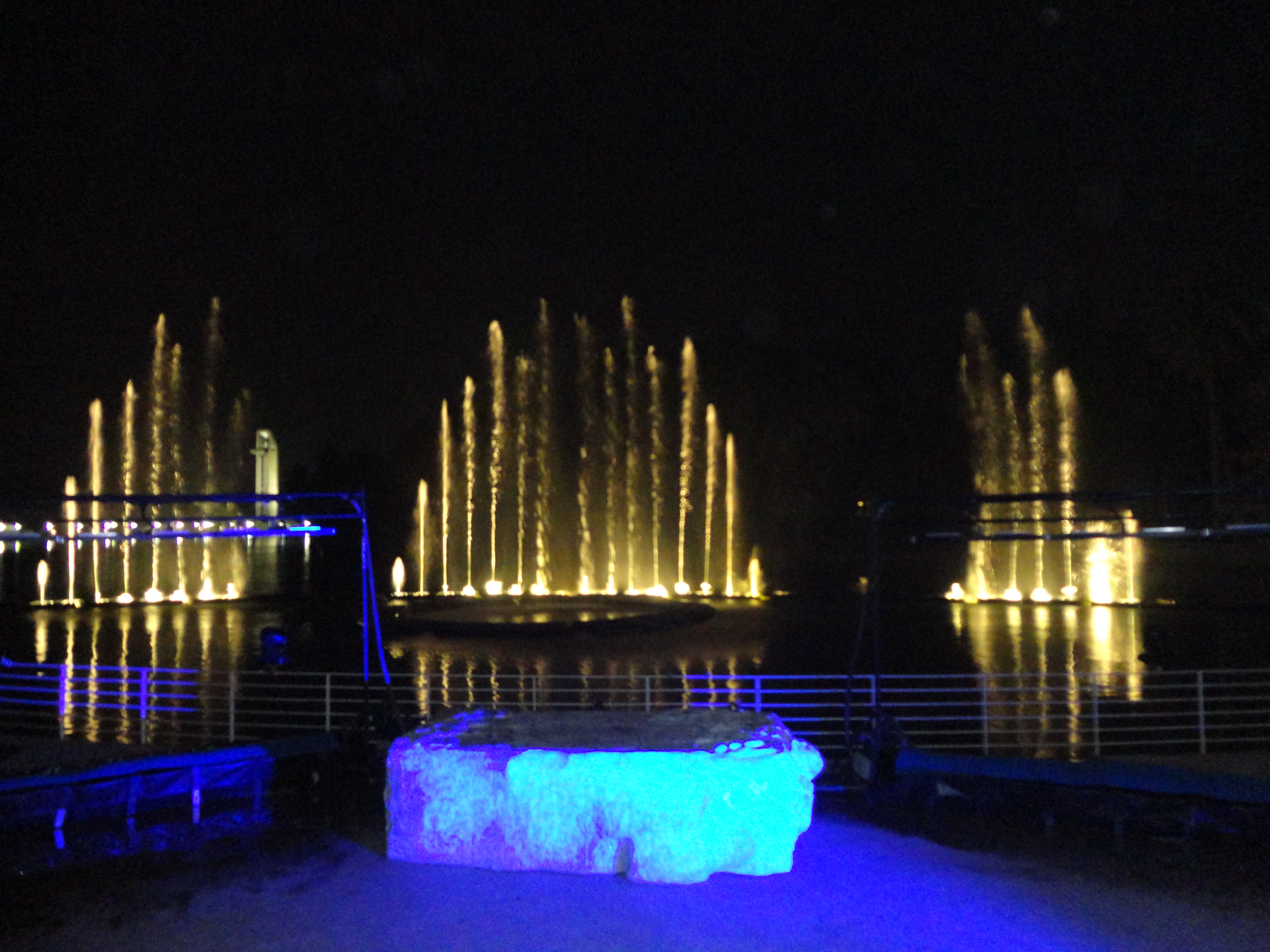 Musica y color, juntos en un espectaculo unico.